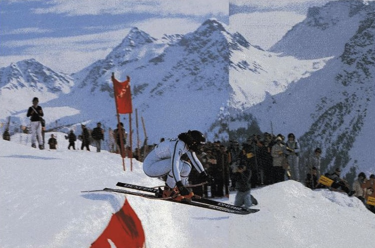 Marie-Cécile Gros-Gaudenier am Tussli-Sprung (Arlenwaldweg)